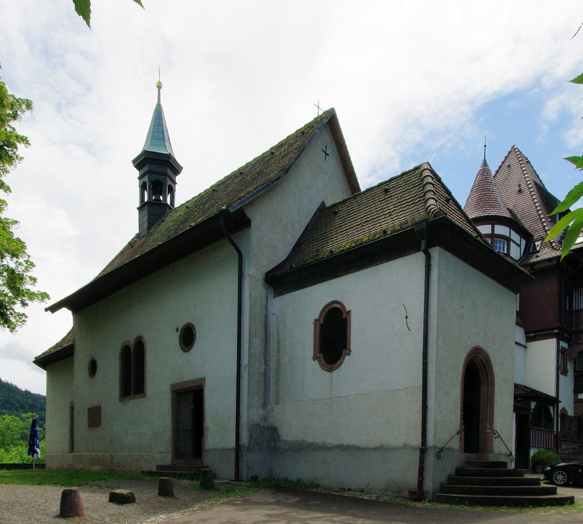 Kapelle von außen mit links dem Eingang zur Hauptkapelle mit der Kanonenkugel oberhalb des Eingangs und rechts der Eingang zur Josephskapelle